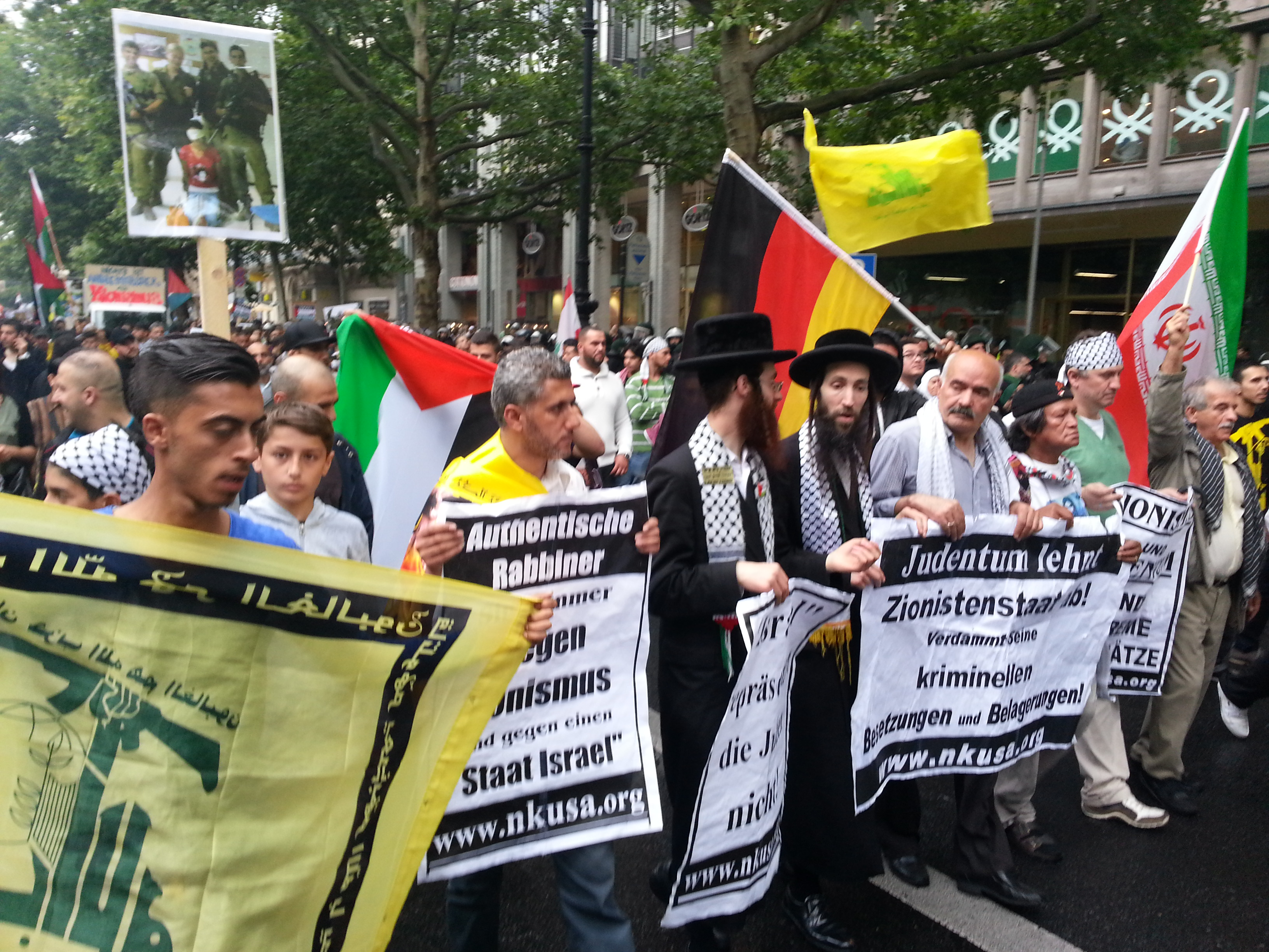 Demonstration Al-Quds 2014 Berlin Kurfürstendamm - Spitze des Demonstrationszugs - 2 ultraorthodoxe Rabbiner der Neturei Karta demonstrieren gegen den "zionistischen Staat Israel"